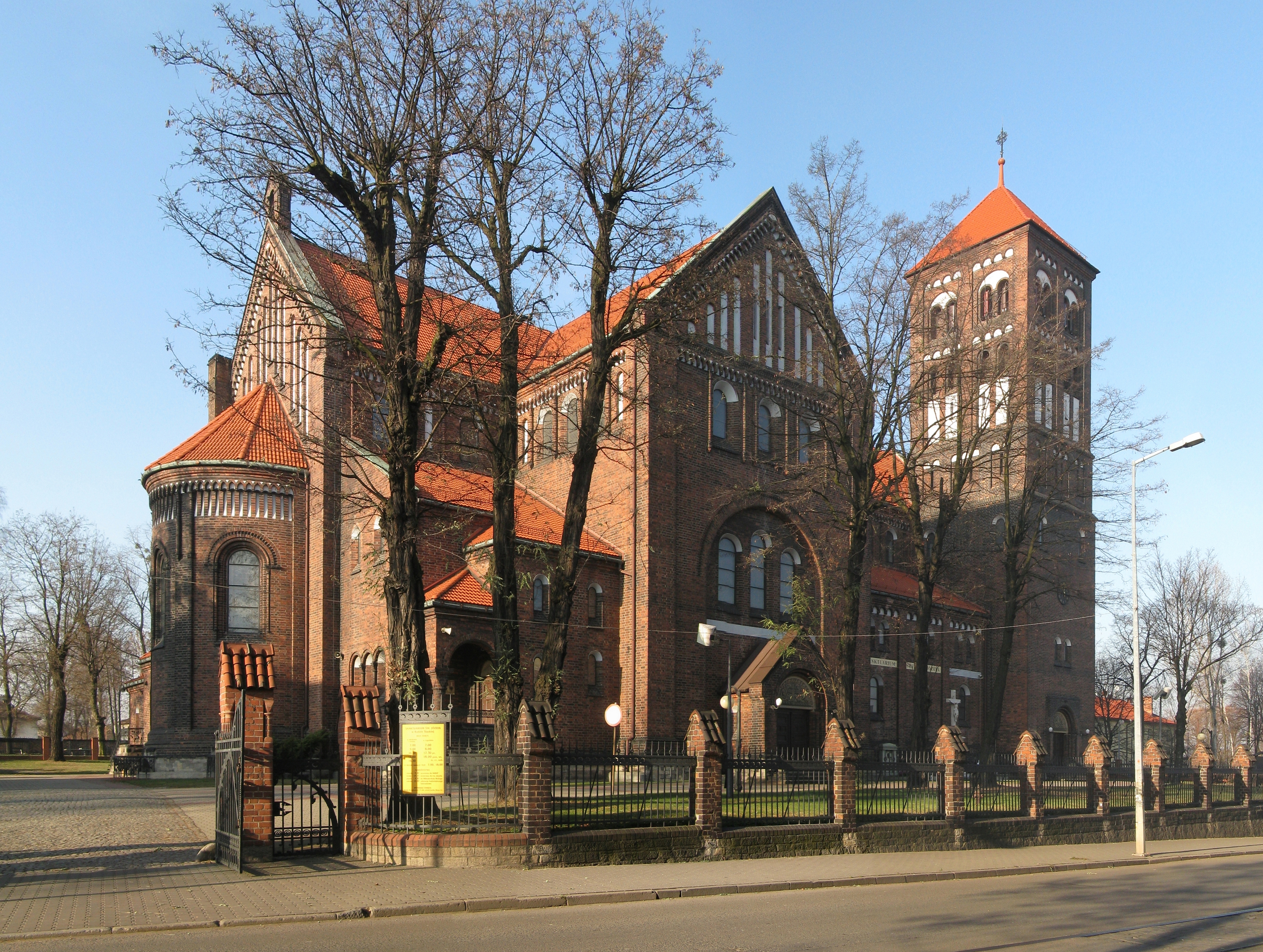 Kościół św. Józefa w Rudzie Śląskiej, widok z ulicy Piastowskiej.